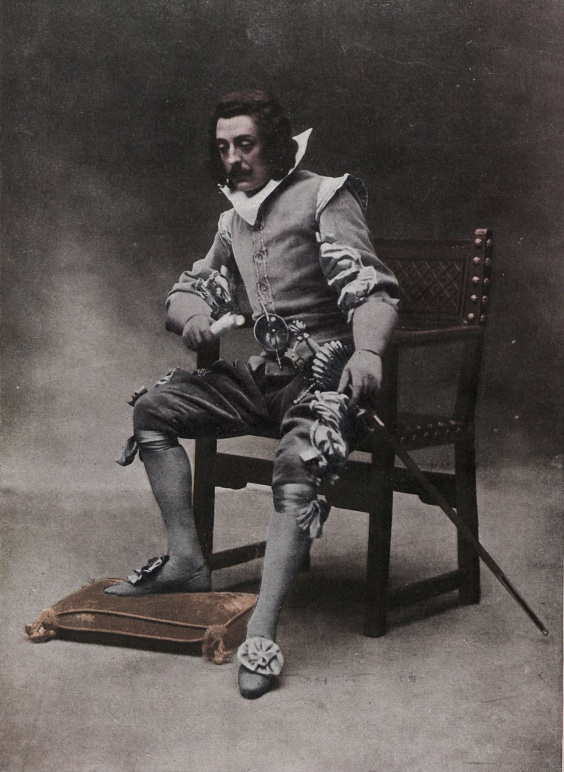 Don Francisco Morano, del Teatro de la Comedia en «Don Gil de las calzas verdes».